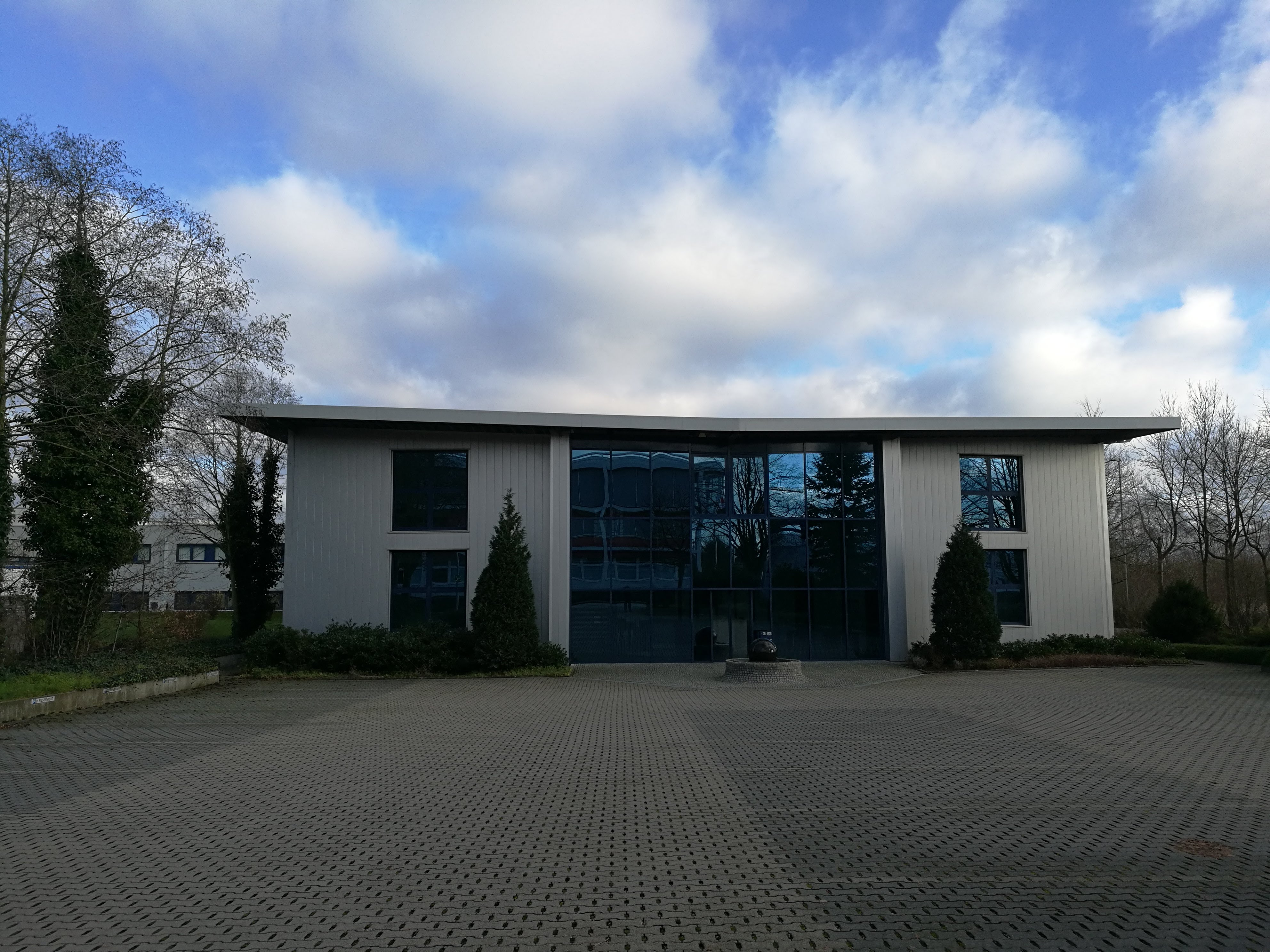 T&A Herford Hauptverwaltung